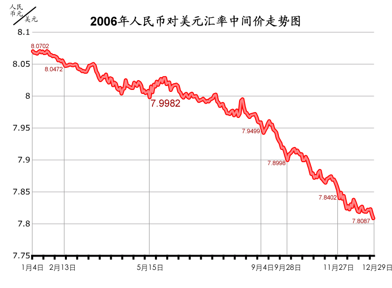 Kurs čínského jüanu vůči americkému dolaru.